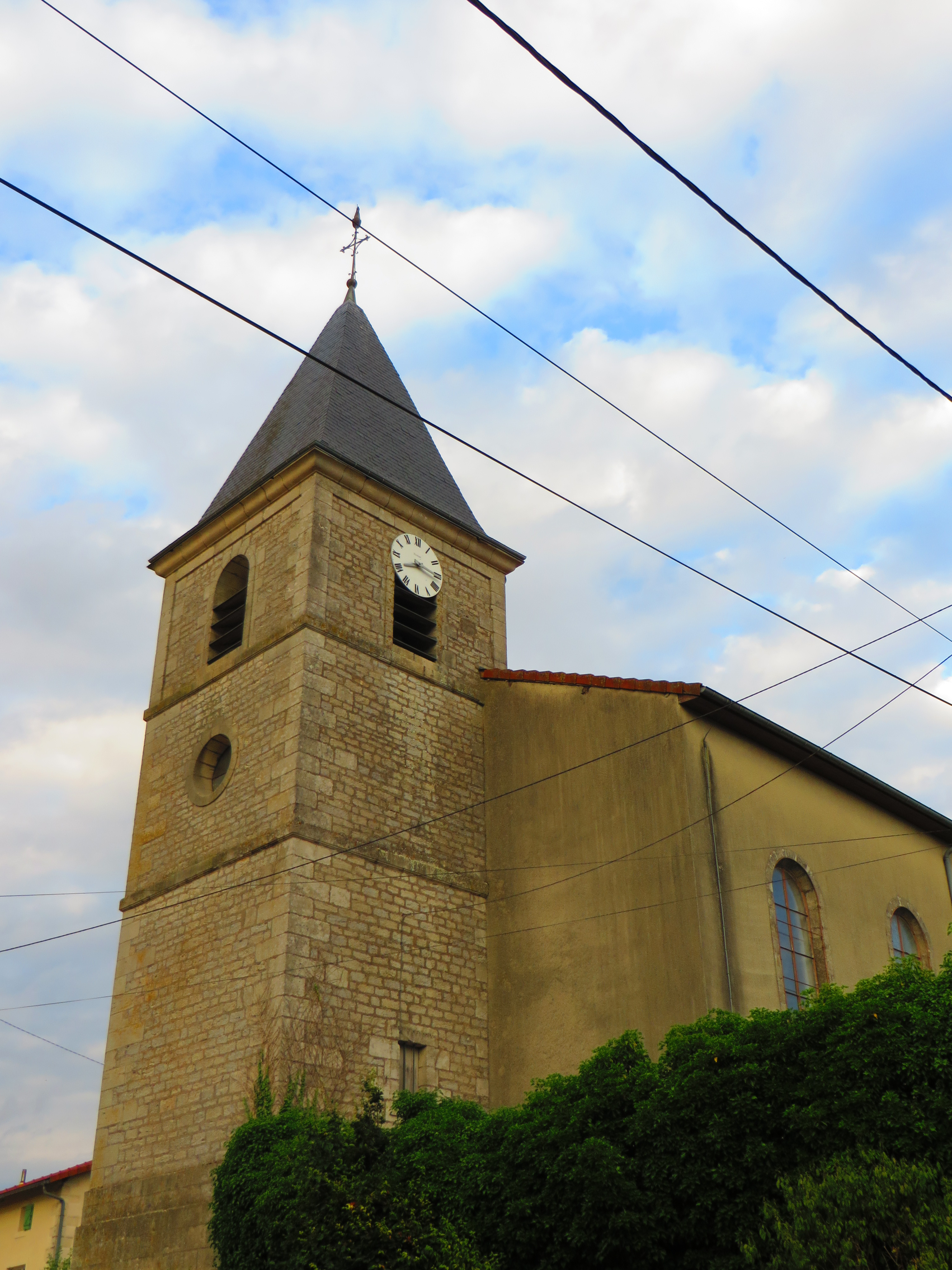 Dombasle-en-Argonne Église Saint-Basle